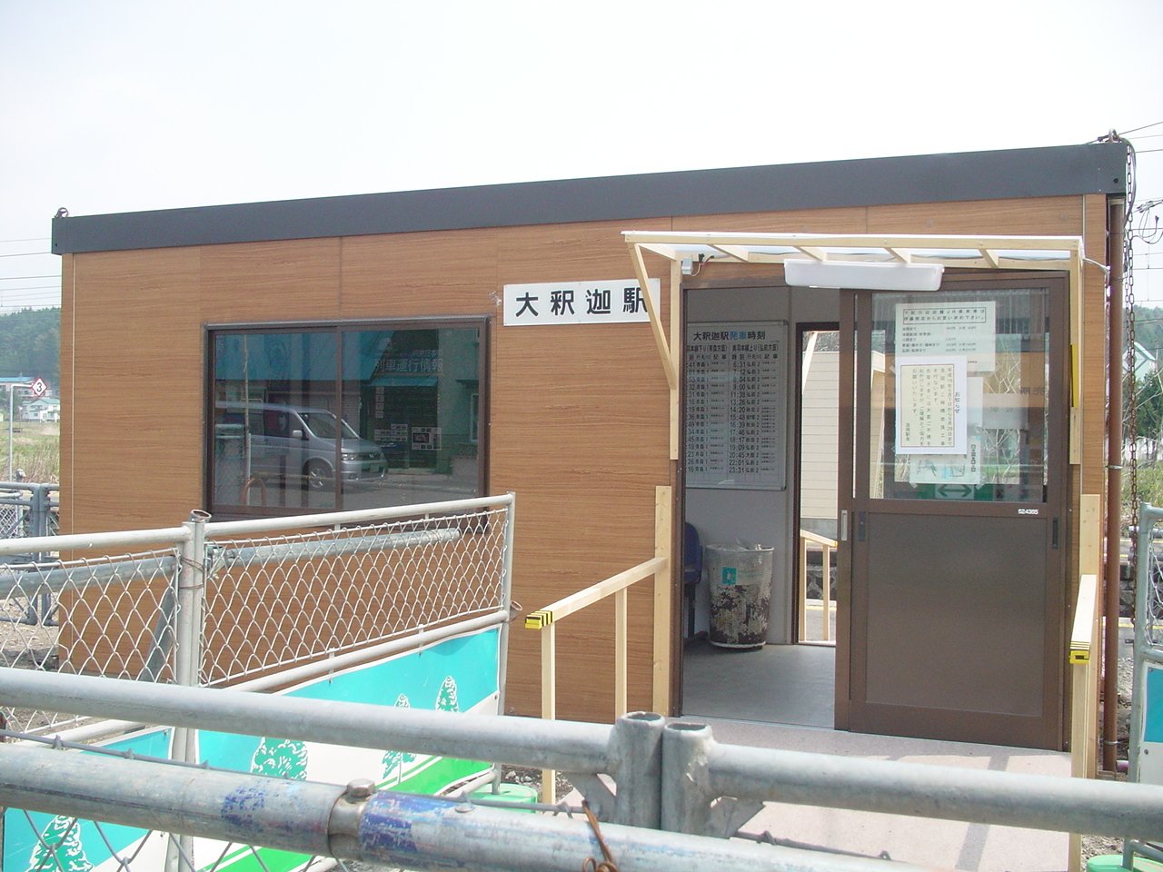 （仮設大釈迦駅）